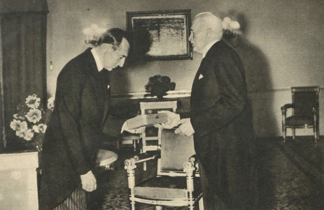 Prezydent Ignacy Mościcki wręcza Order Orła Białego Józefowi Beckowi, ministrowi spraw zagranicznych. 9 października 1938.